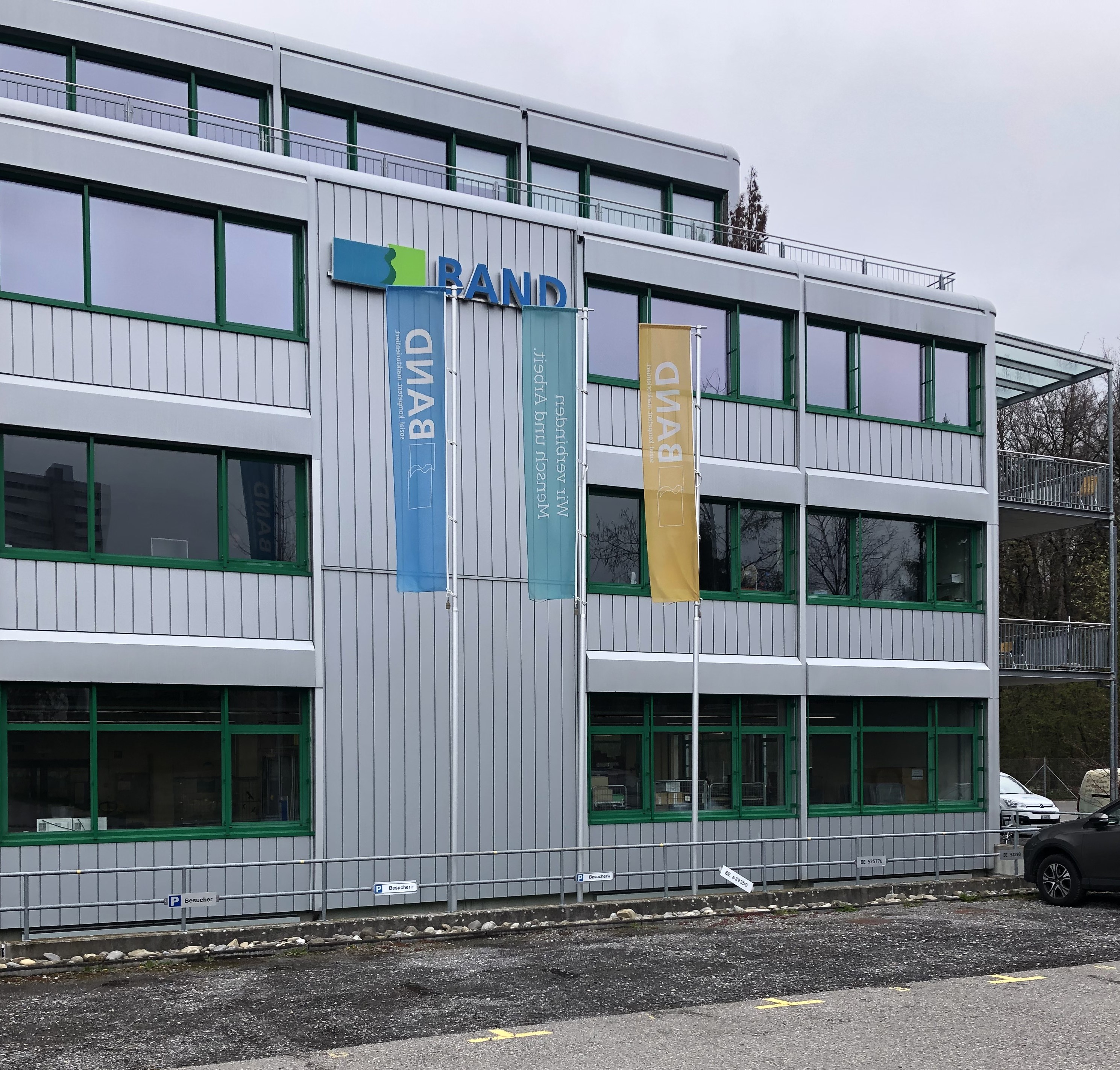 Ackerli Genossenschaft BAND